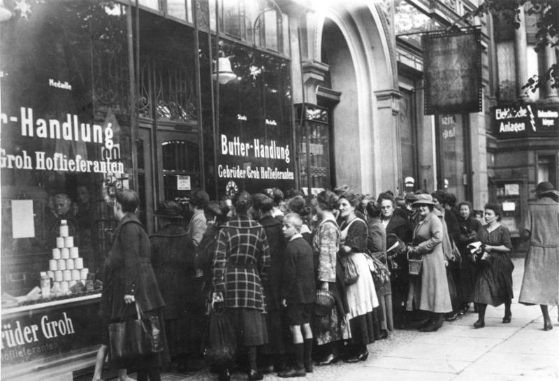 Information added by Wikimedia users.Laut Berliner Adressbuch von 1923 befand sich die Butterhandlung Groh in der Schmidstraße 5, Berlin SO 16 (Berlin-Mitte, Nähe Kreuzberg).